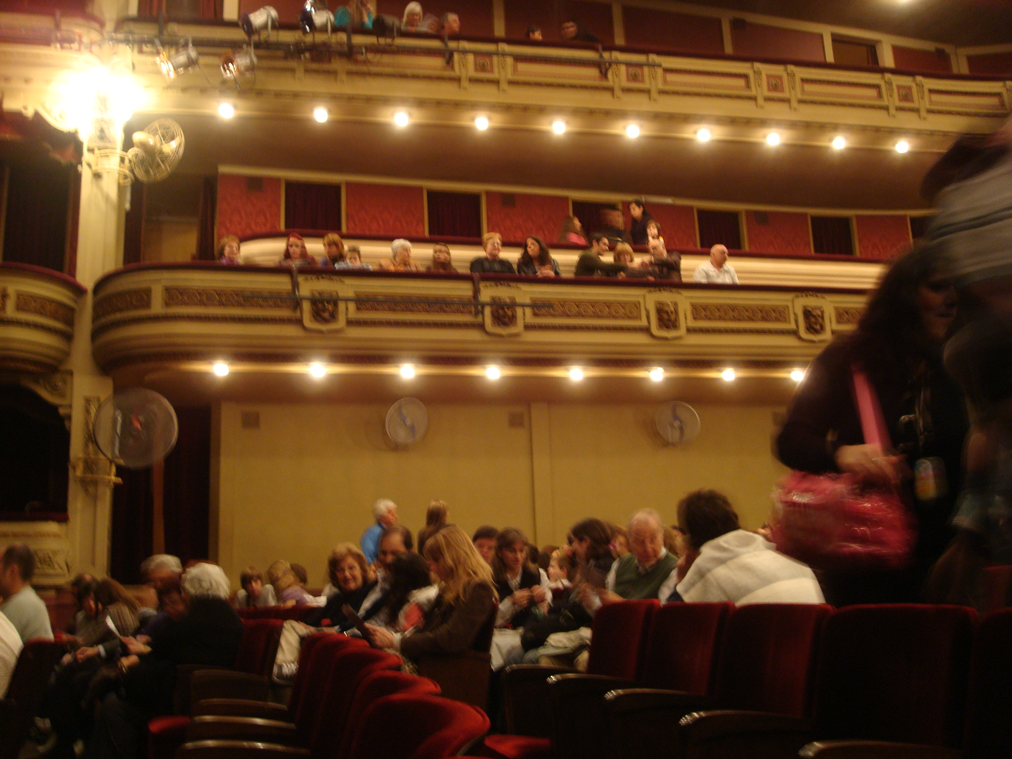 Vista de la sala del Auditorio "Fundación Héctor I. Astengo" (antiguamente Teatro Odeón), en la ciudad de Rosario, Santa Fe, Argentina